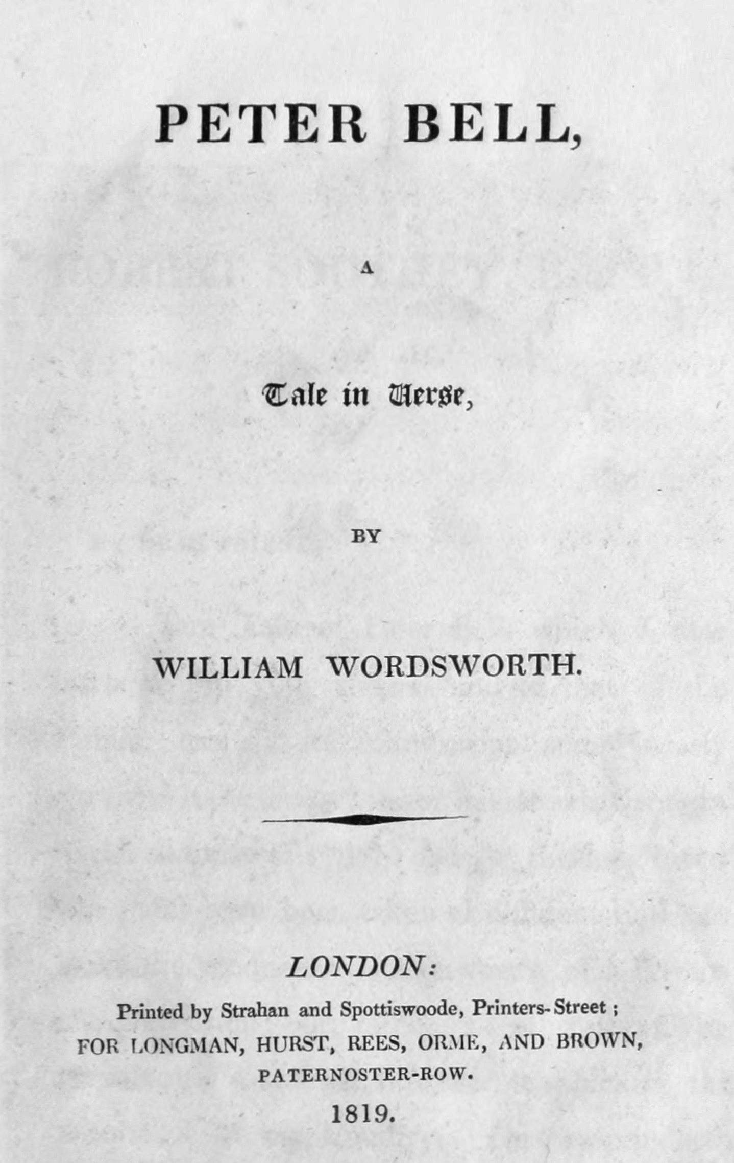 Peter Bell 1st ed title pg